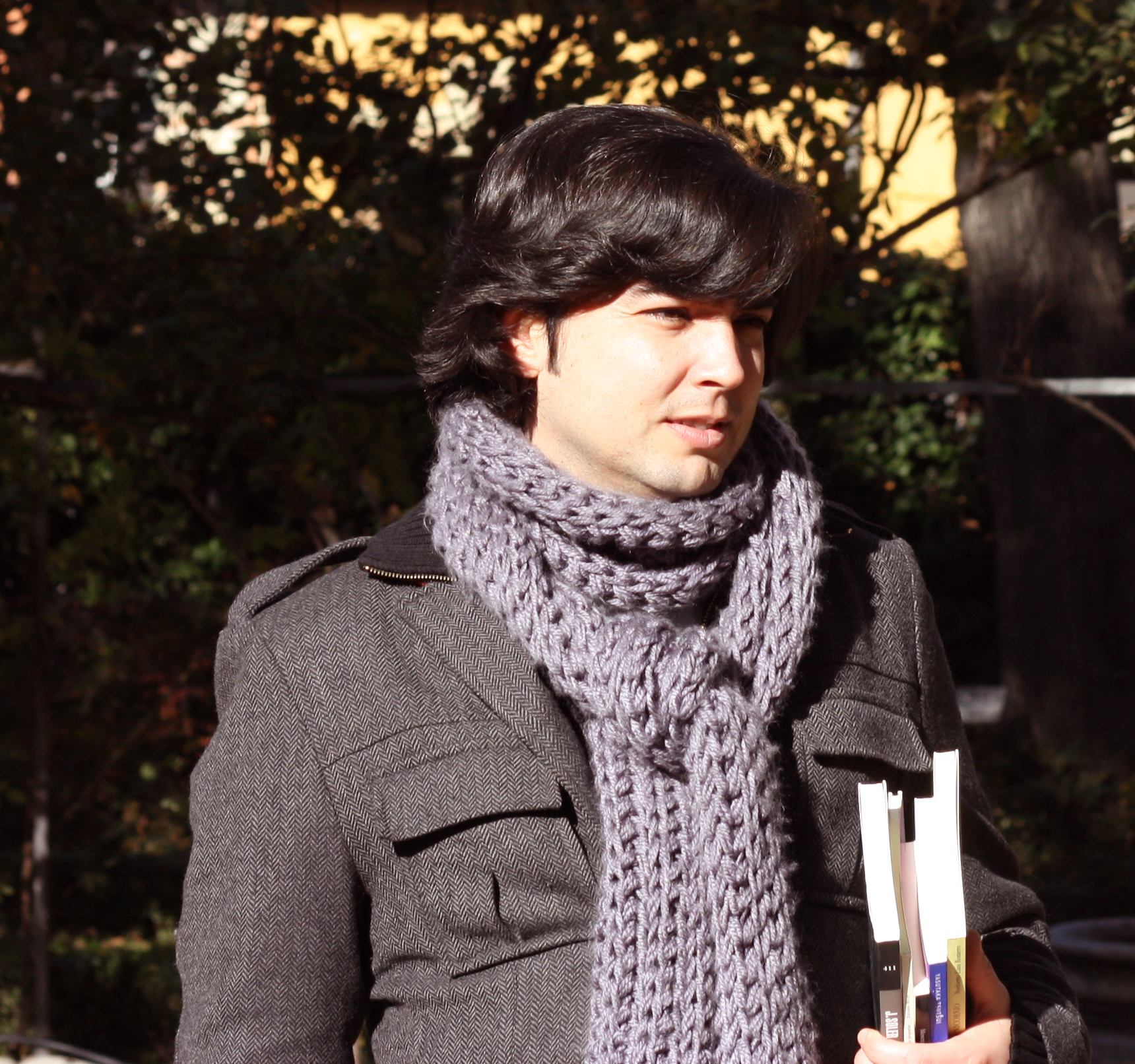 Esta fotografía fue tomada en el Jardín del Príncipe de Anglona, en La Latina, Madrid.